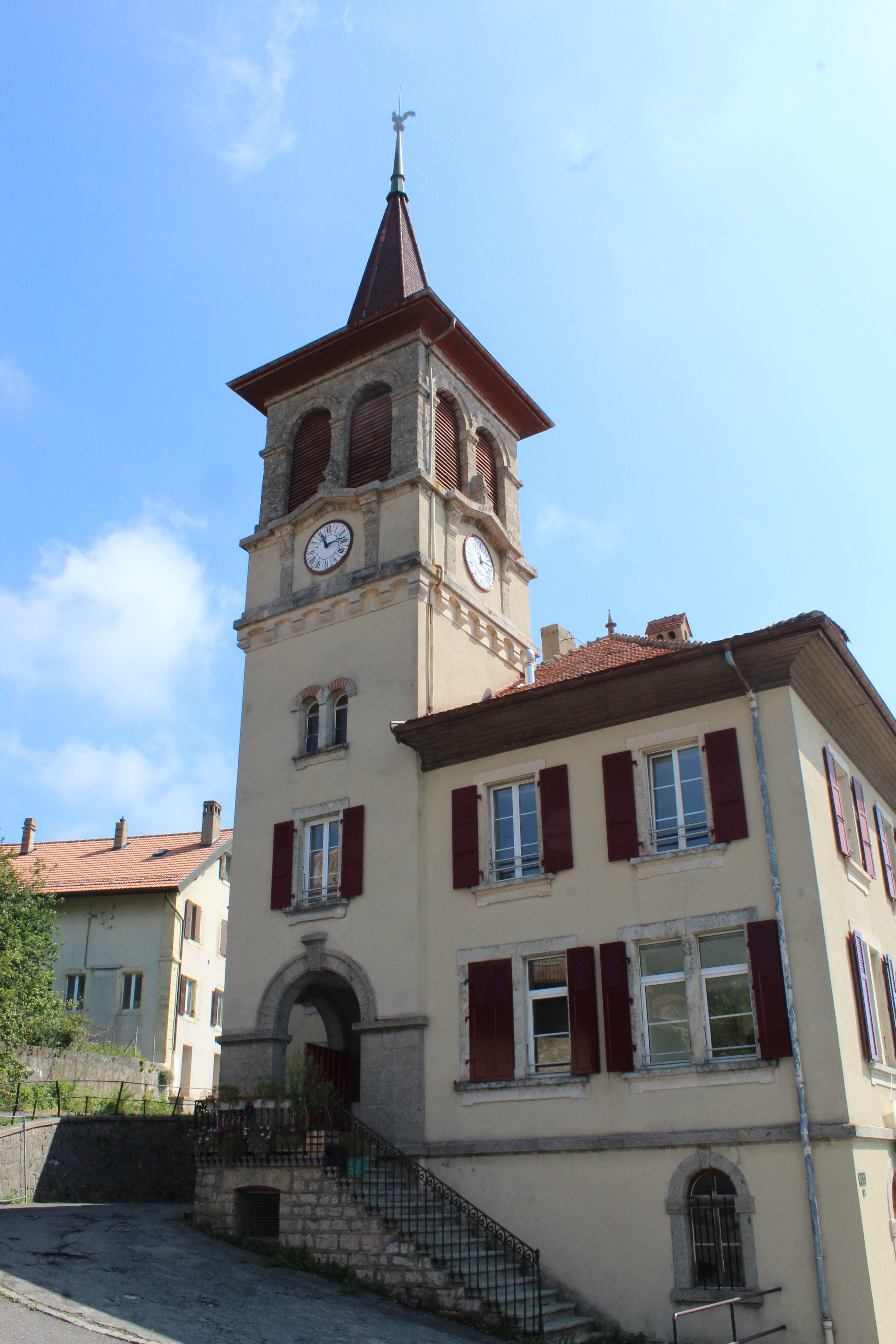 La mairie